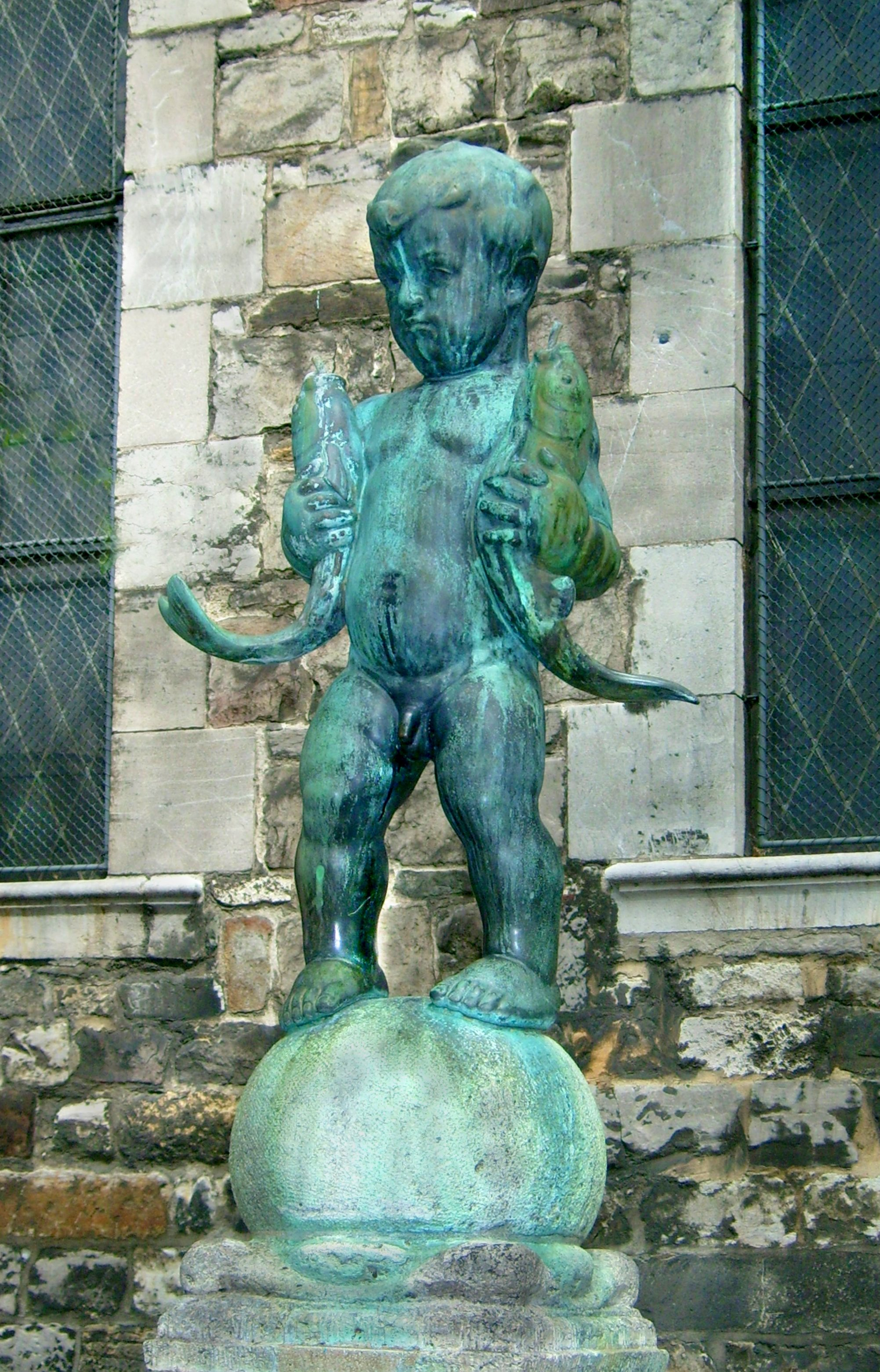 Fischpüttelchen in Aachen, von Hugo Lederer